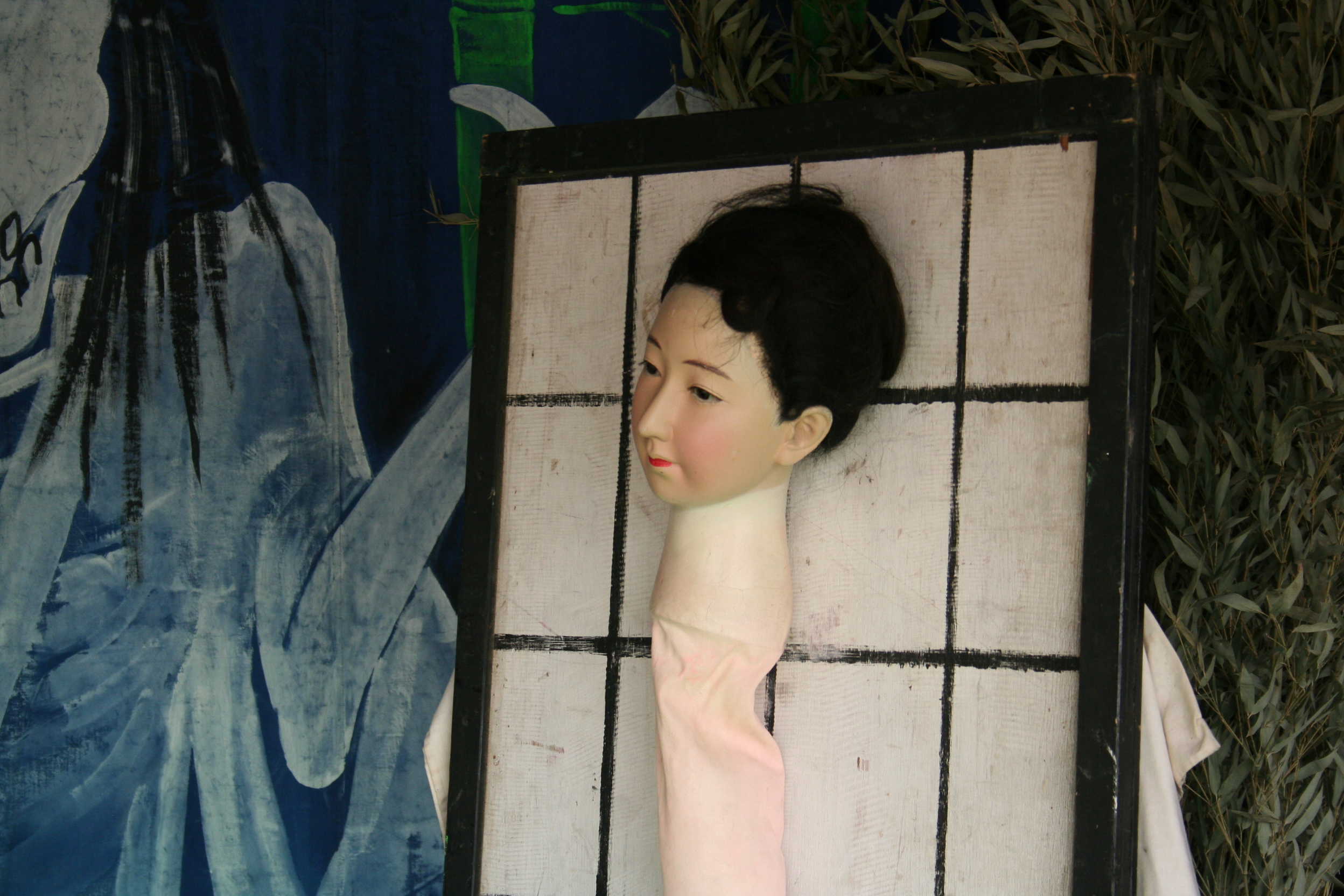 2010年6月22日から23日に、兵庫県姫路市姫路城南の大手前公園にて開催された姫路浴衣祭の催しの様子など。祭り初日を撮影。 Rokurokubi. 轆轤首（ろくろくび)の人形。